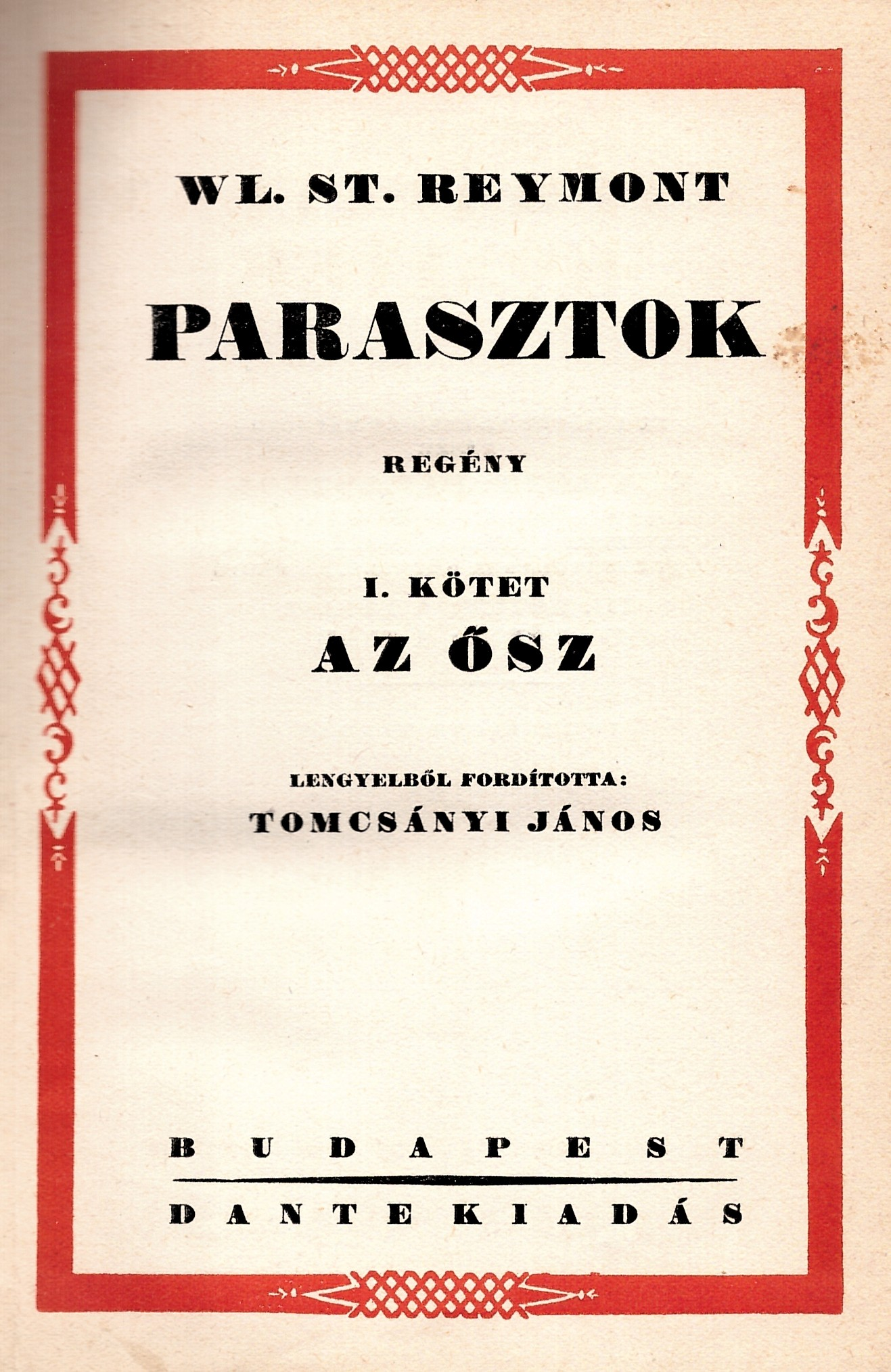 Władysław Stanisław Reymont (1867-1925): Parasztok (1920-as évekbeli kiadás)